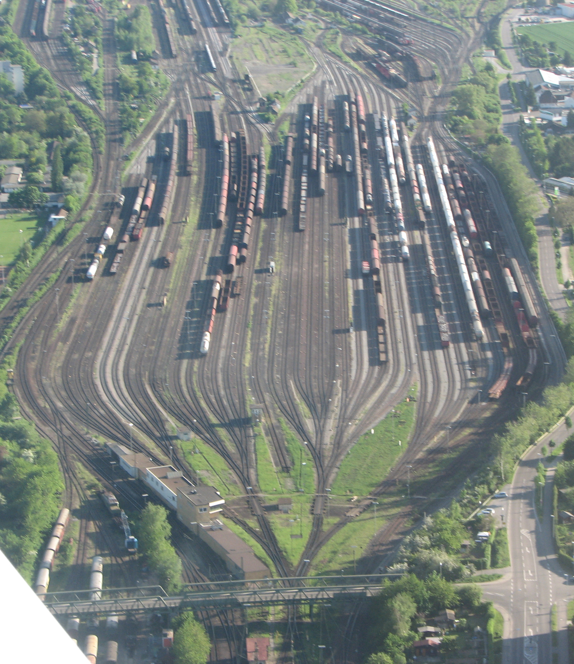 Rangierbahnhof Kornwestheim - Luftaufnahme